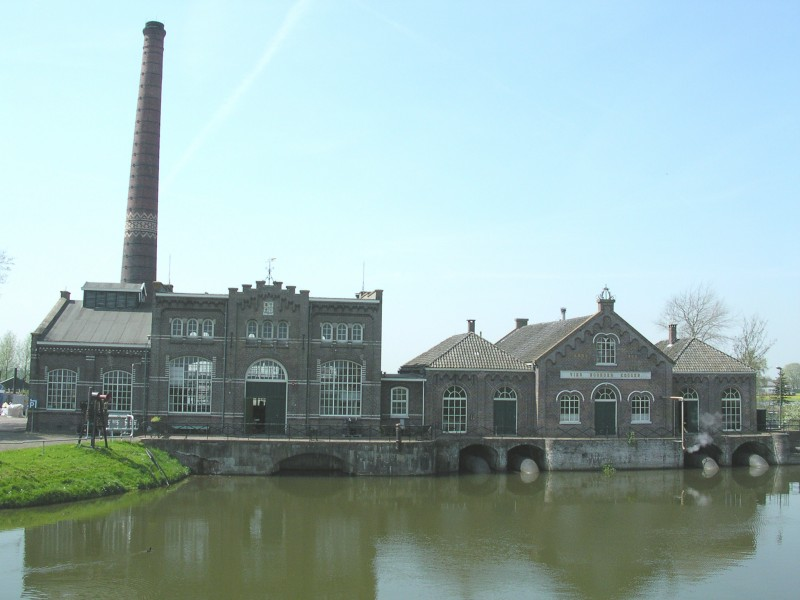 Het Stoomgemaal Vier Noorder Koggen te Medemblik, met daarin ook gevestigd het museum voor stoommachines, Het Nederlands Stoommachinemuseum. The steam-powered pumping station Stoomgemaal Vier Noorder Koggen in city of Medemblik. still in use, and also museum for steam engines.